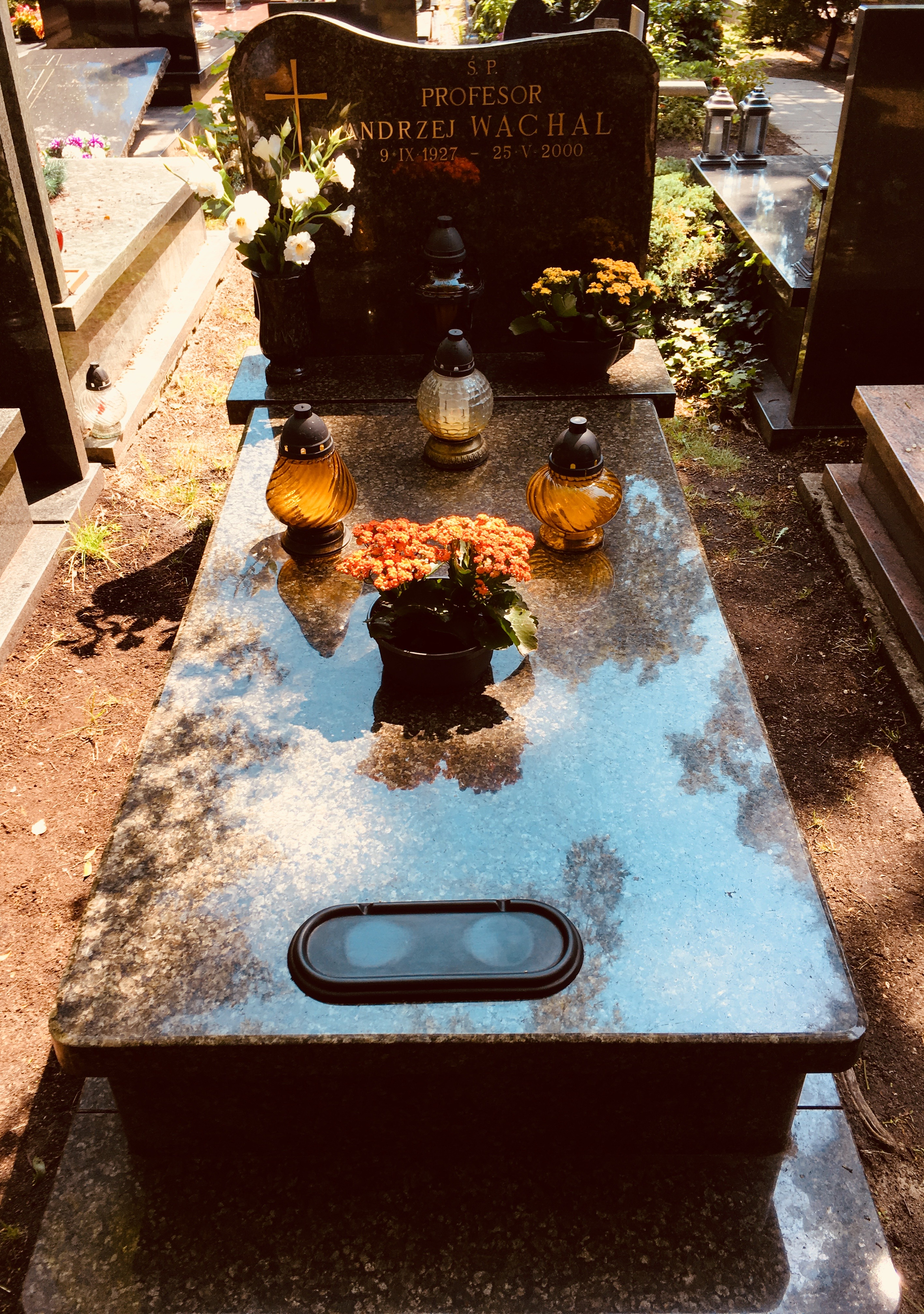 Grób prof. Anrzeja Wachala